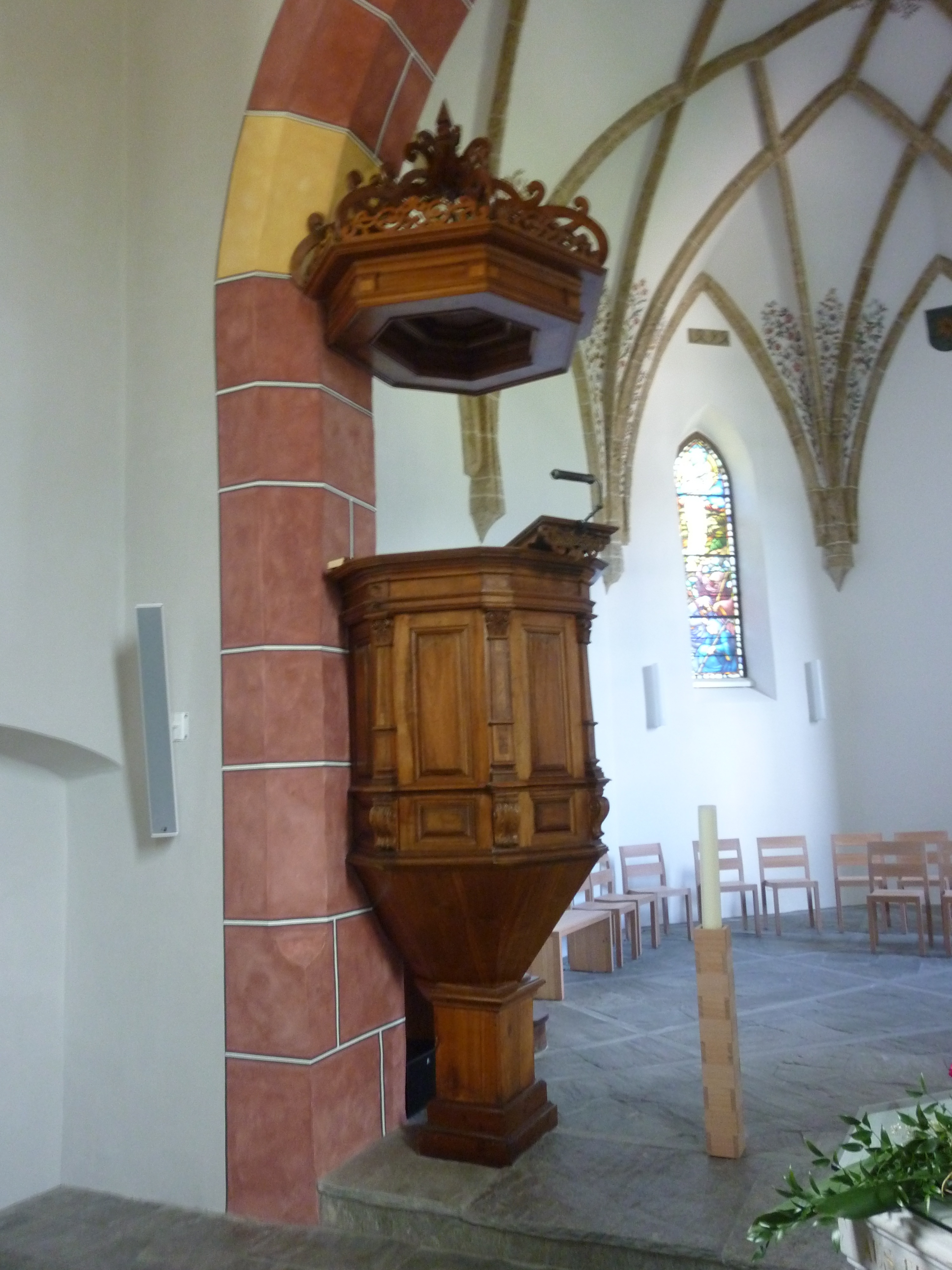 Tamins Kirche Kanzel